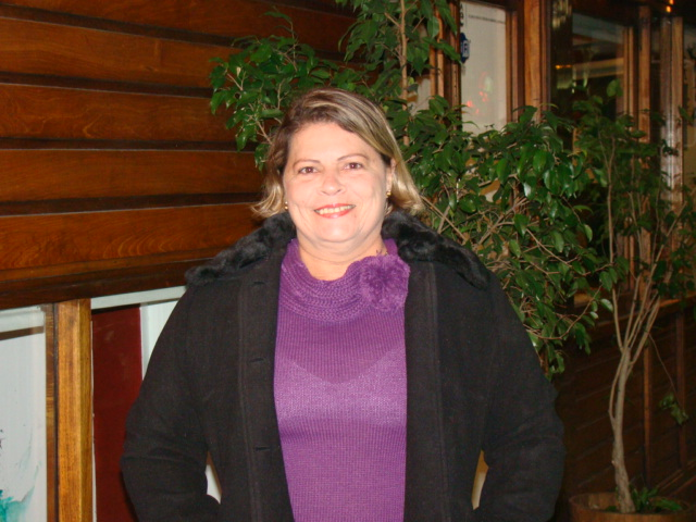 Uma foto minha na argentina